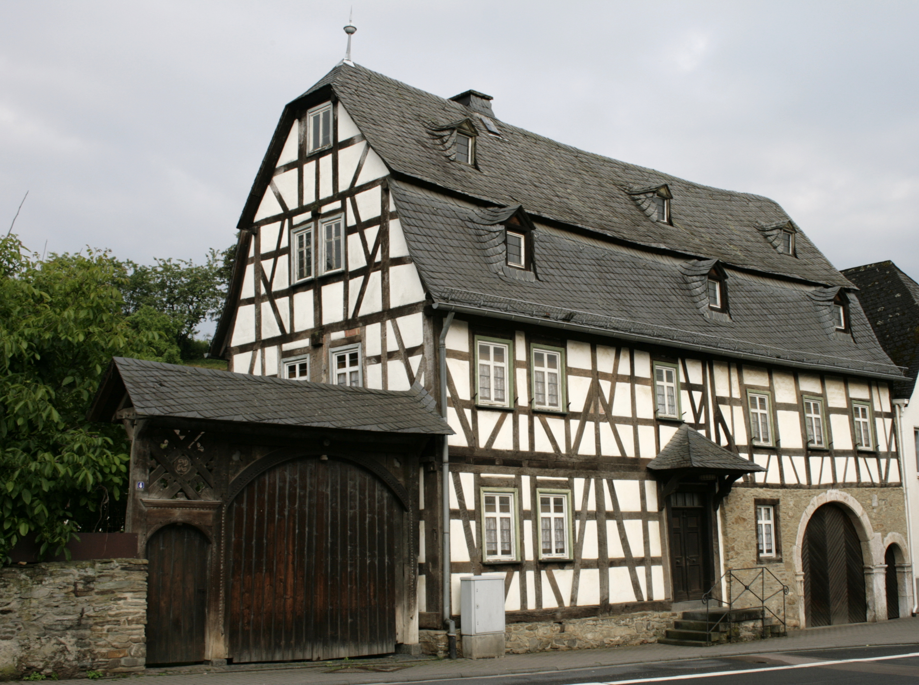 Kammerrat-Schmidtsches Anwesen in Villmar-Weyer, Deutschland